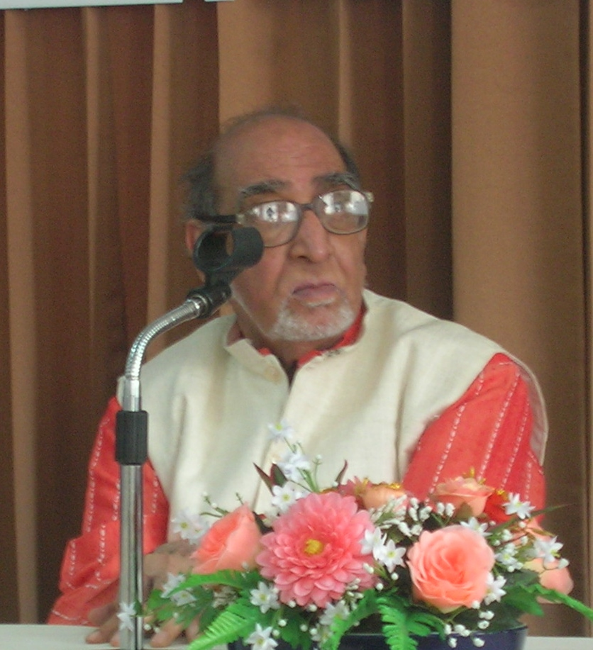 അസ്‌ഗർ അലി എൻ‌ജിനിയർ